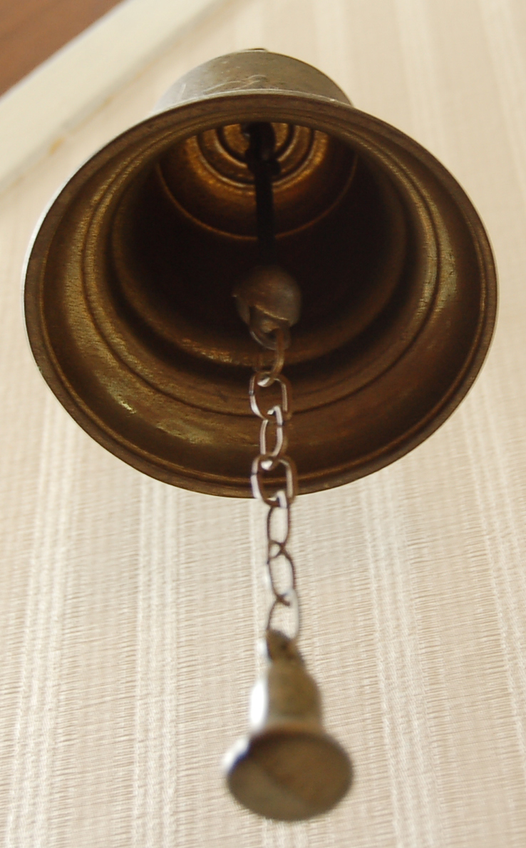 cloche vue de dessous bell